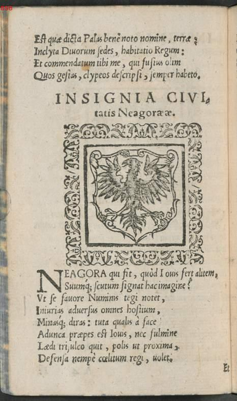 Buchseite - Wappen Neumarkt Opf - Paul Zeidler